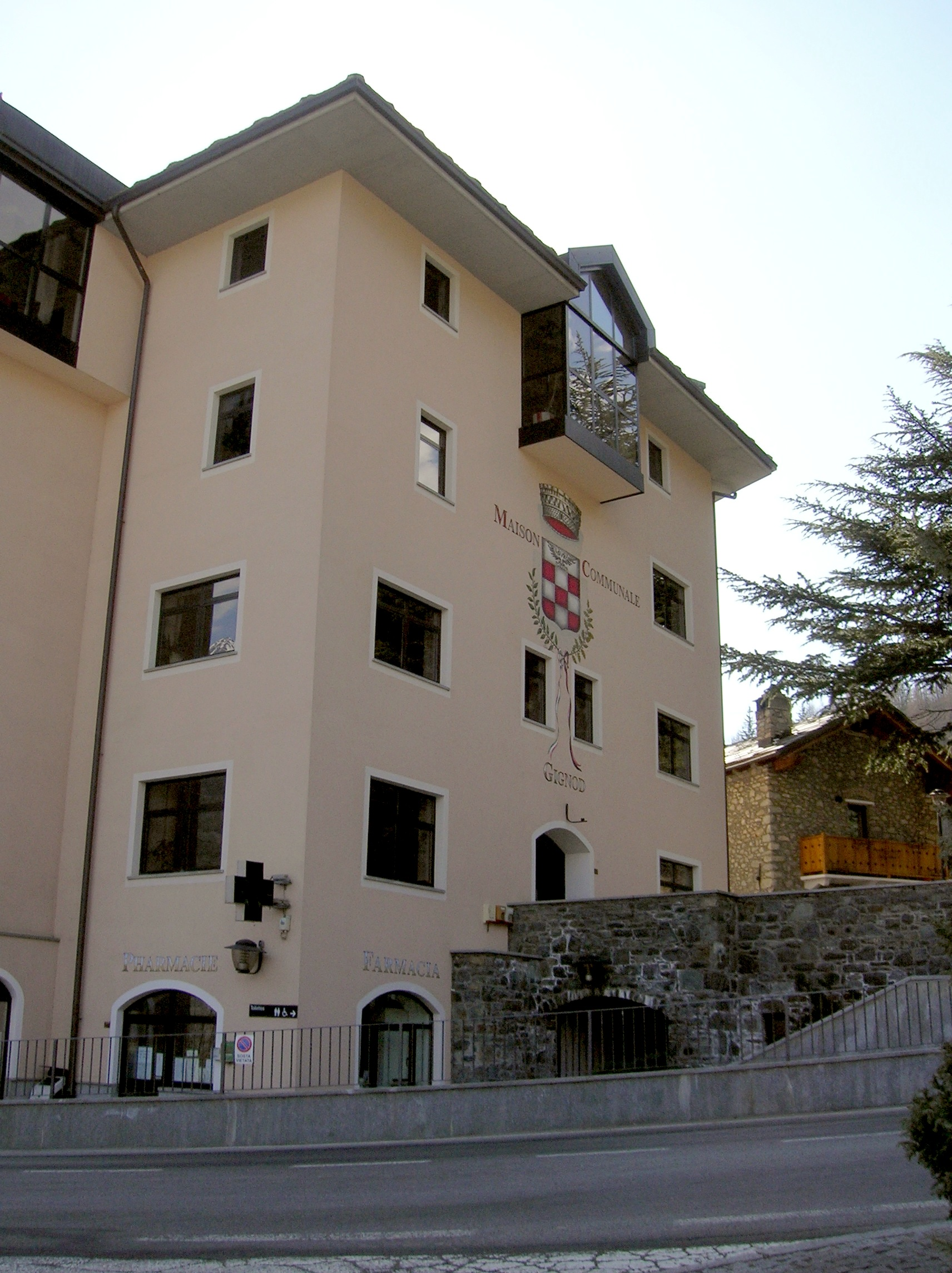 Municipio di Gignod, Valle d'Aosta, Italia.